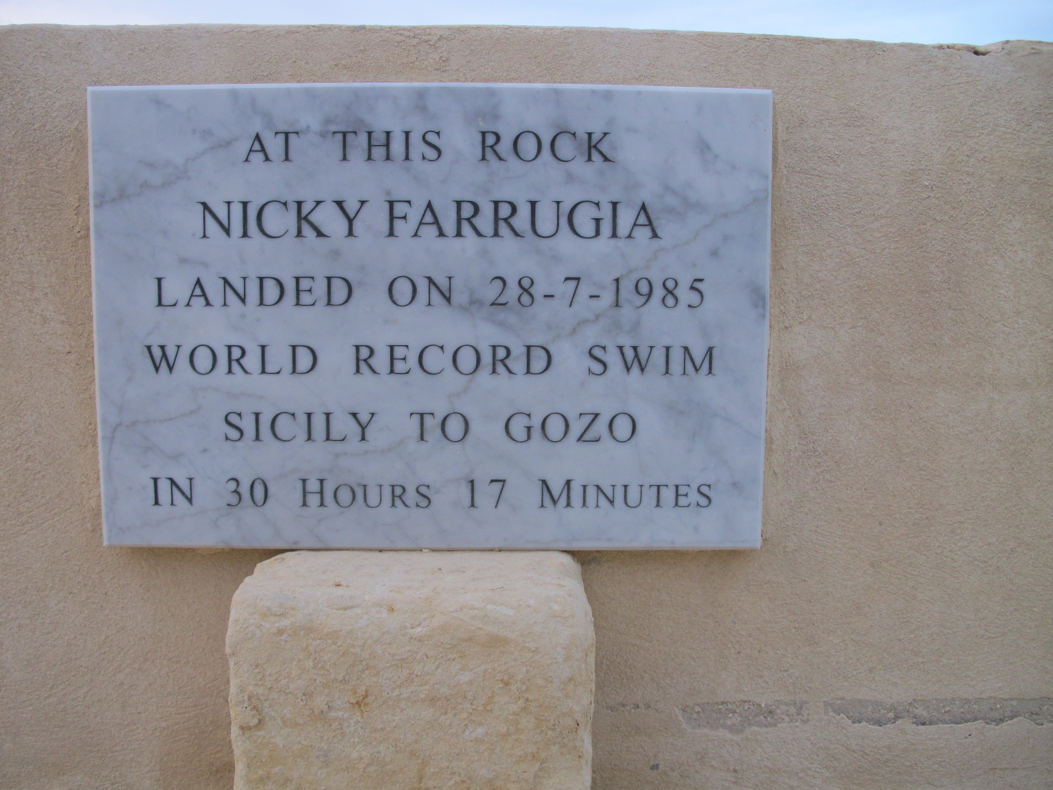 Gedenktafel an der Uferstraße Triq Ix-Xwejni